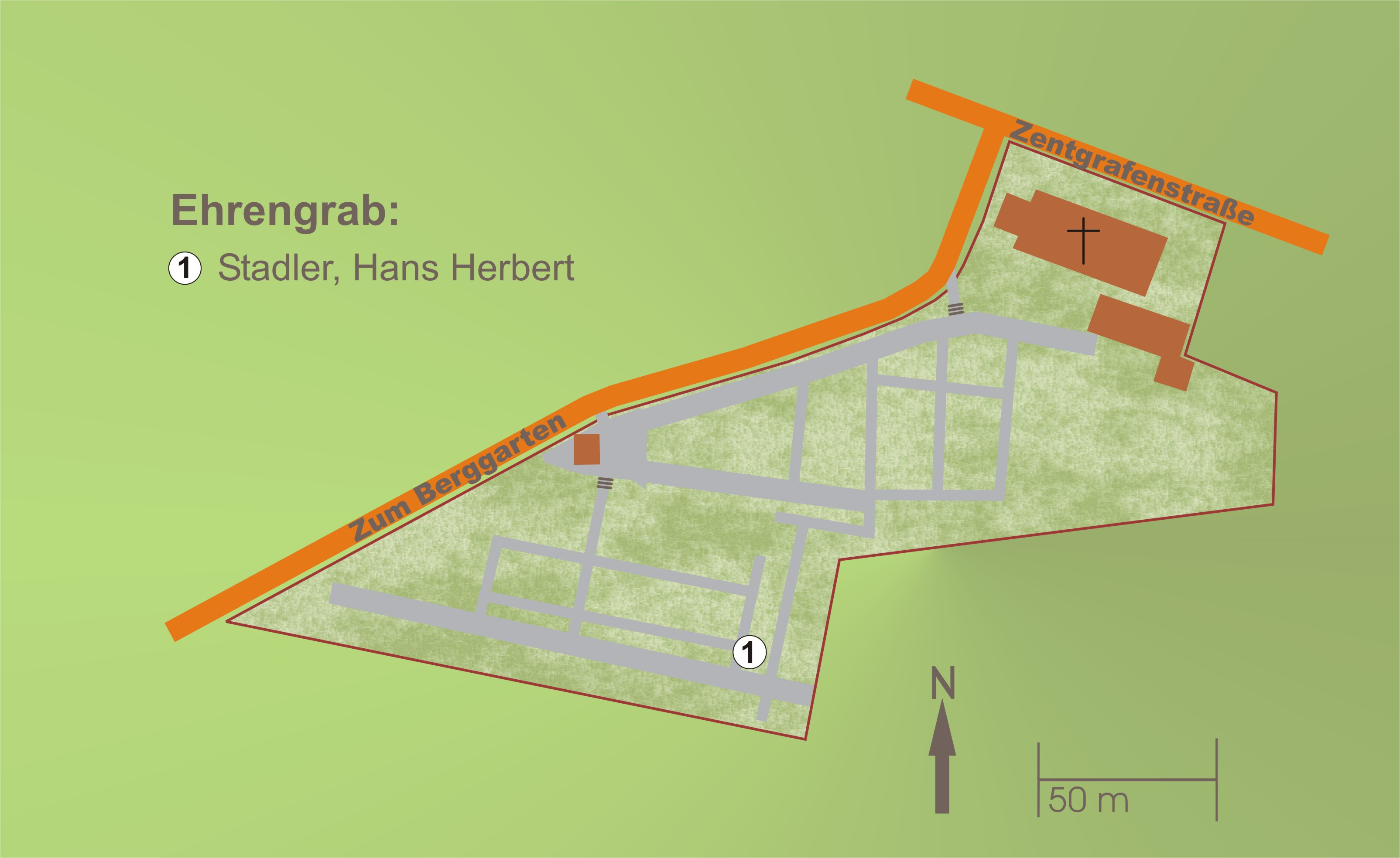 Plan des Friedhofs in Kassel-Kirchditmold (Deutschland)